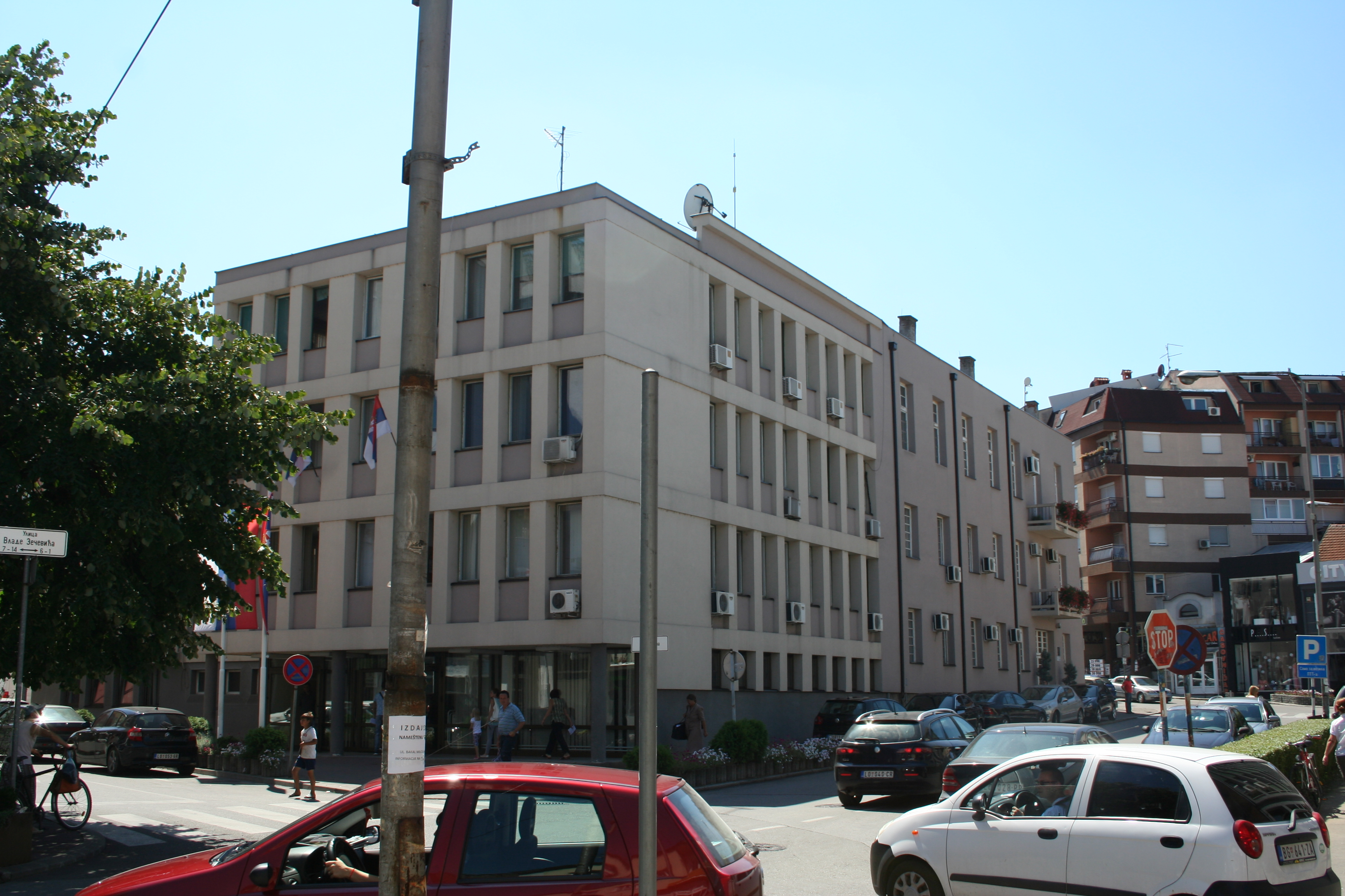 Zgrada SO Loznica